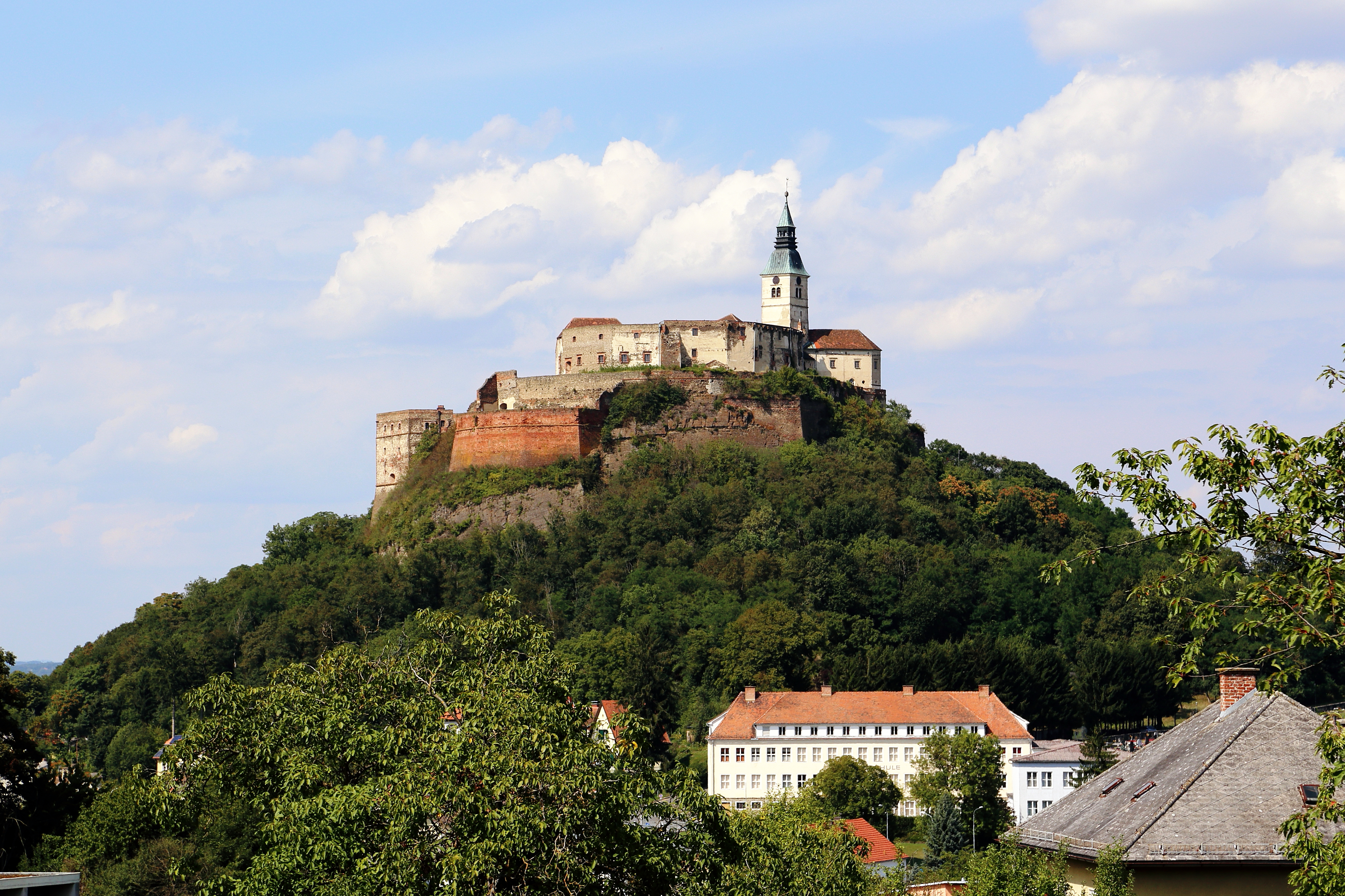 Südwestansicht der Burg Güssing in der burgenländischen Bezirkshauptstadt Güssing. Eine auf einem weithin sichtbar steilen Kegel vulkanischen Ursprungs Mitte des 12. Jahrhunderts errichtete Burg und damit älteste Burg Burgenlands. Im 16. und 17. Jahrhundert erfolgte der Ausbau zu einer Festung. Wegen der "Dachsteuer" gab man sie im 18. Jahrhundert dem Verfall preis. Seit 1957 wird eine Bestandssicherung betrieben und 1969 wurde das neue Burgmuseum eröffnet.